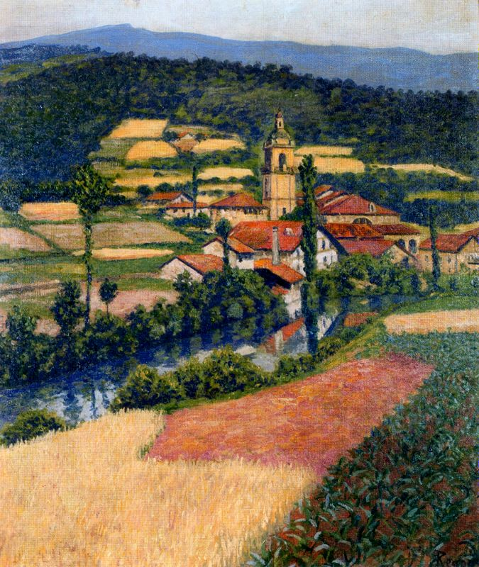 Yurretalabel QS:Les,"yurreta"